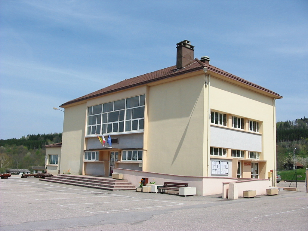 Ban-sur-Meurthe-Clefcy Commune des Vosges La mairie « unifiée » Photographie personnelle, prise le 3 mai 2006 Copyright © Christian Amet